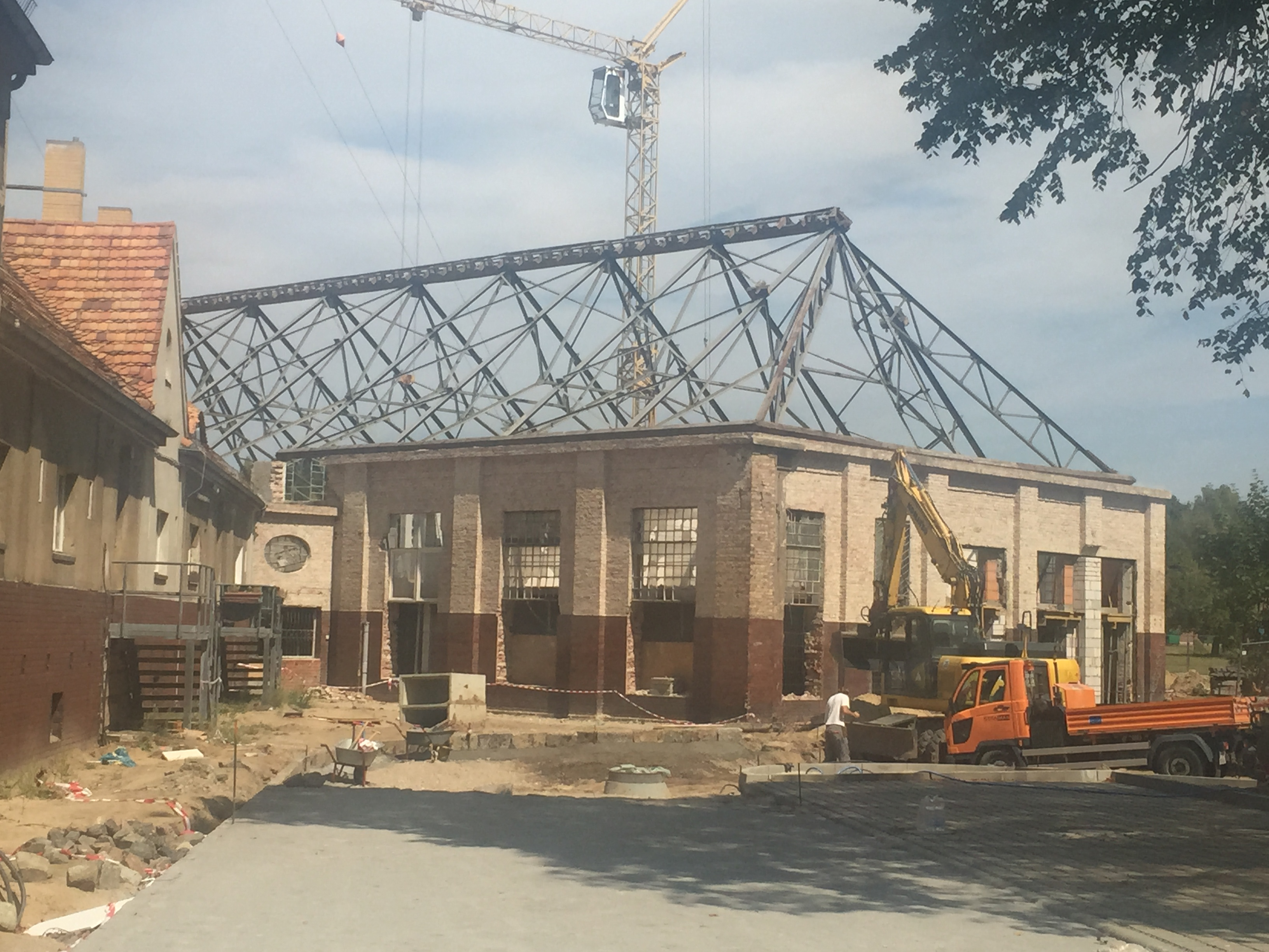 Königs Wusterhausen, Funkerberg. Ehem. Reithalle während der Sanierung, 2015.